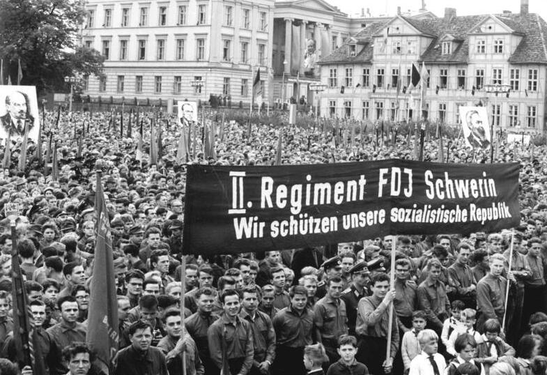 ADN-ZB-Junge-Schwerin: Großkundgebung am 9.9.1961 auf dem "Alten Garten" anläßlich der Kreis- und Gemeindewahlen. - Blick auf das II. FDJ-Regiment Schwerin. " Information added by Wikimedia users.